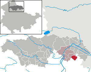 Hauteroda in Thuringia - Kyffhäuserkreis